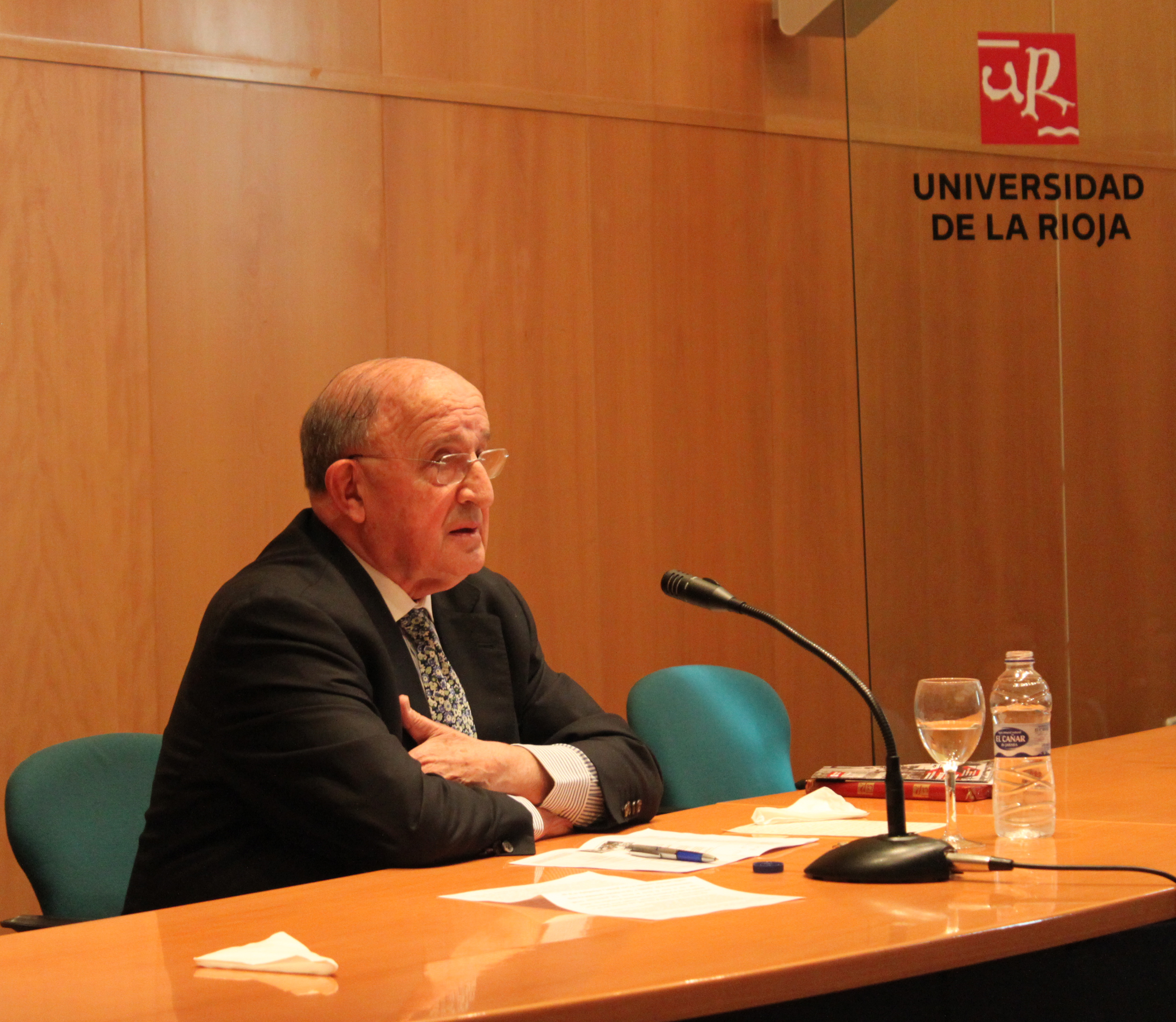 José Antonio Escudero, en la Sala de Grados de la Universidad de La Rioja.